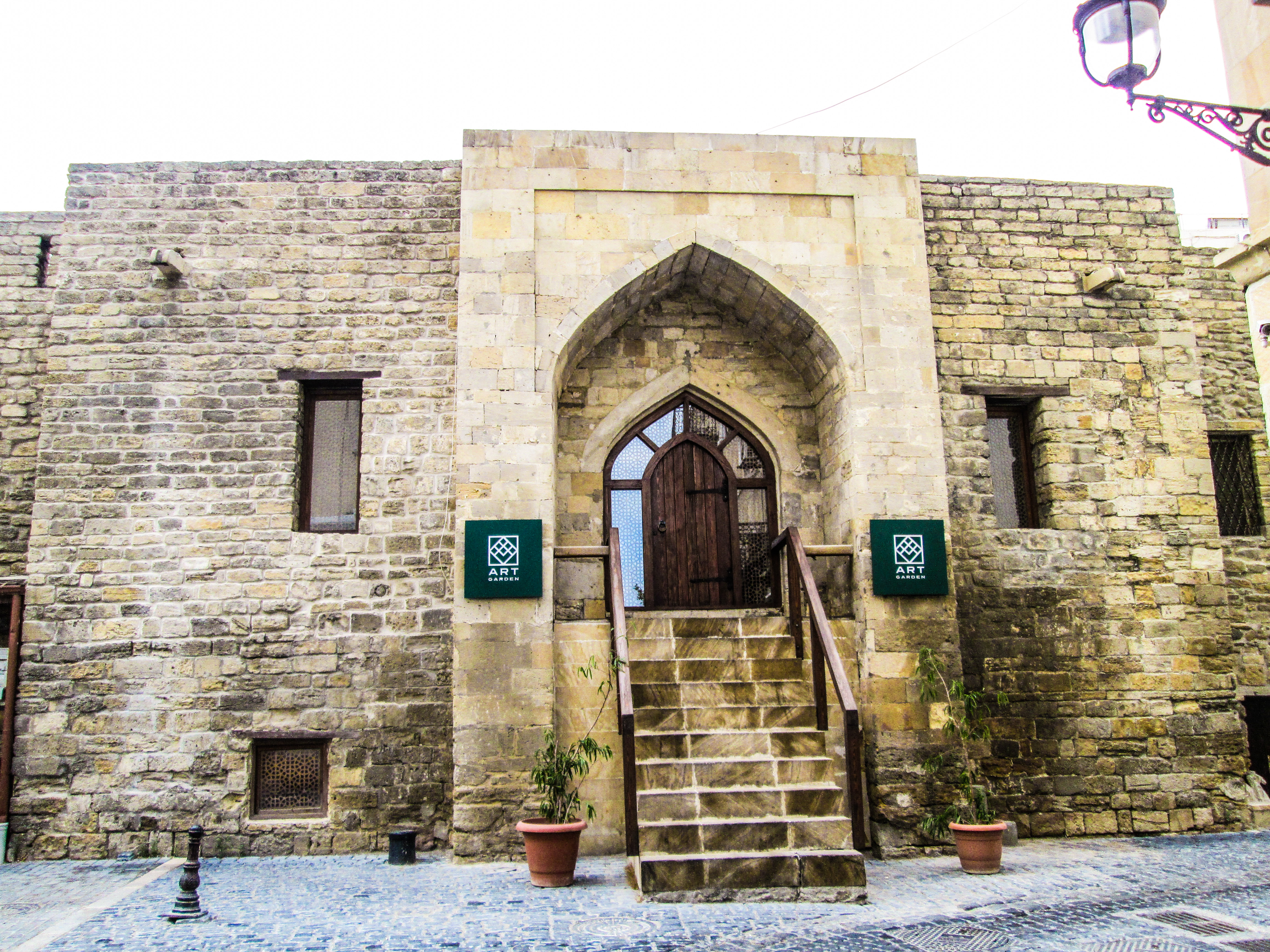 Kiçik karvansarayın H.Rzayeva küçəsindən görünüşü